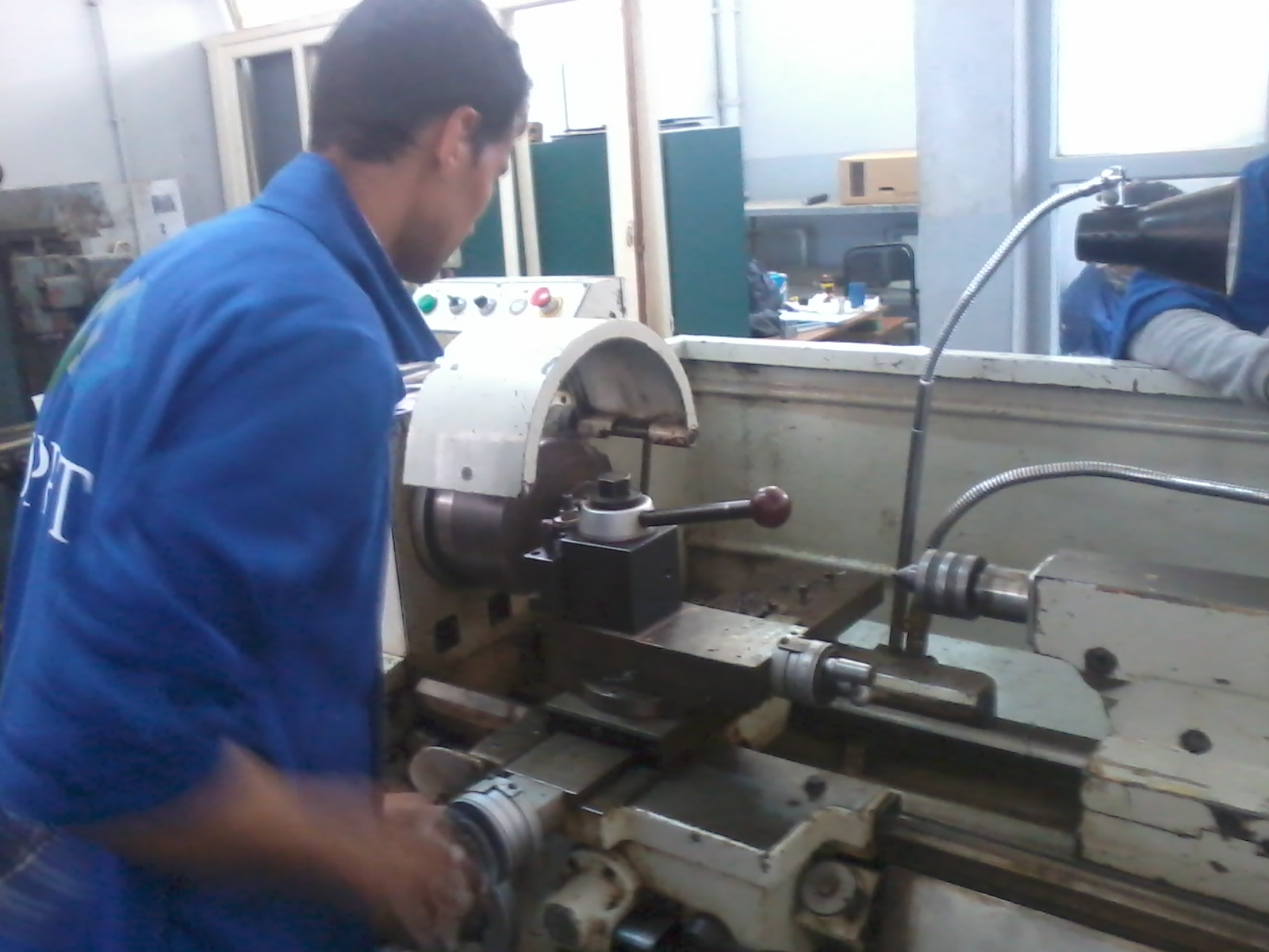 ofppt